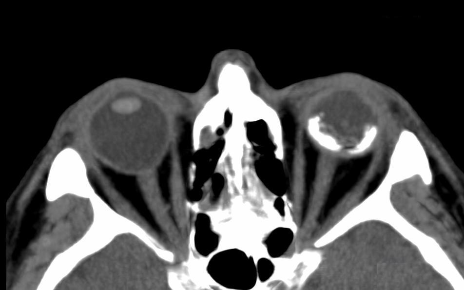 Phthisis bulbi des linken (im Bild rechten) Auges nach Unfall (Computertomographie)